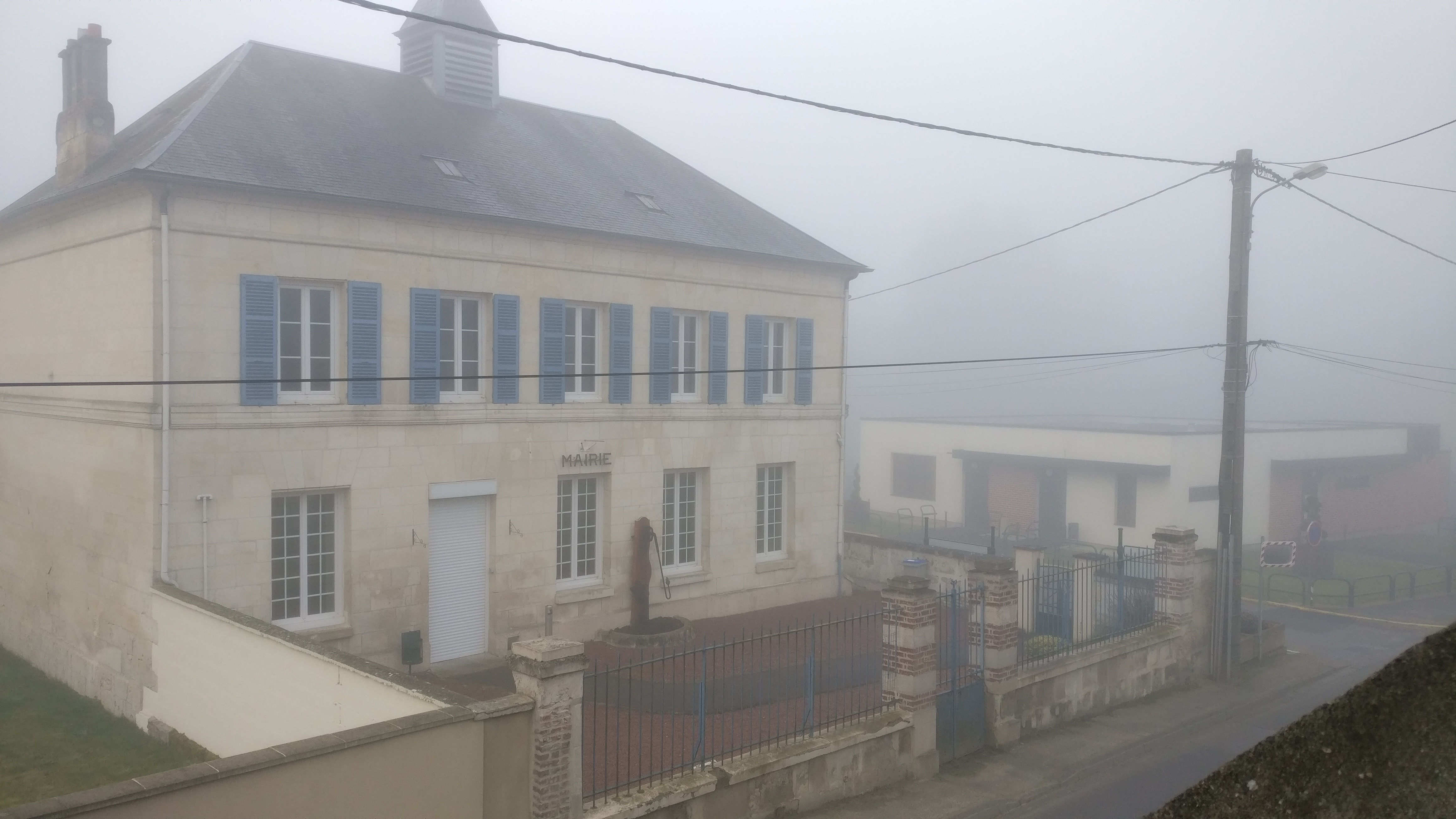 La mairie de Chevincourt sous le brouillard du mois de février 2017